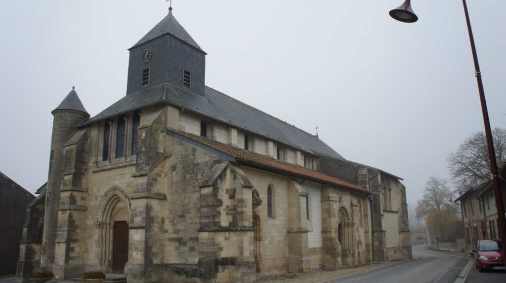 vue de l'Eglise de Hans par le sud ouest.